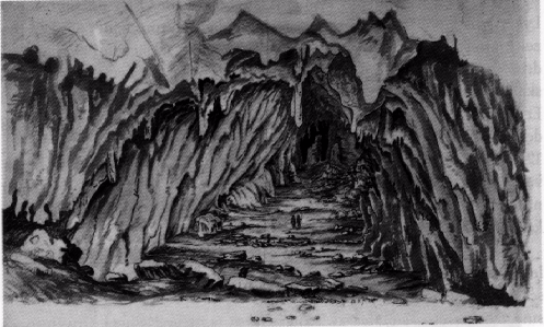 De Corycaeïsche Grot door W. Gell uit 1806 - de beste man moet derhalve wel langer dan 70 jaar dood zijn - dus geen copyright